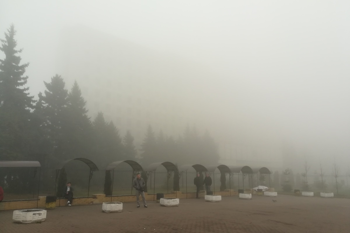 Сильний туман в Києві 24 жовтня 2019 року